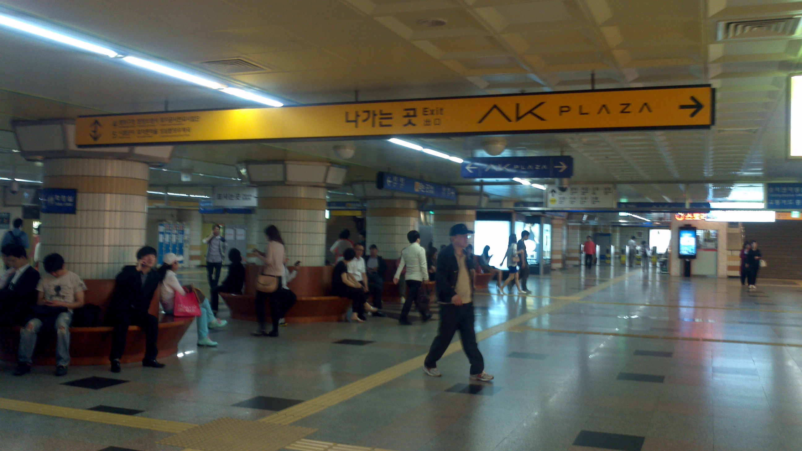 서현역 대합실